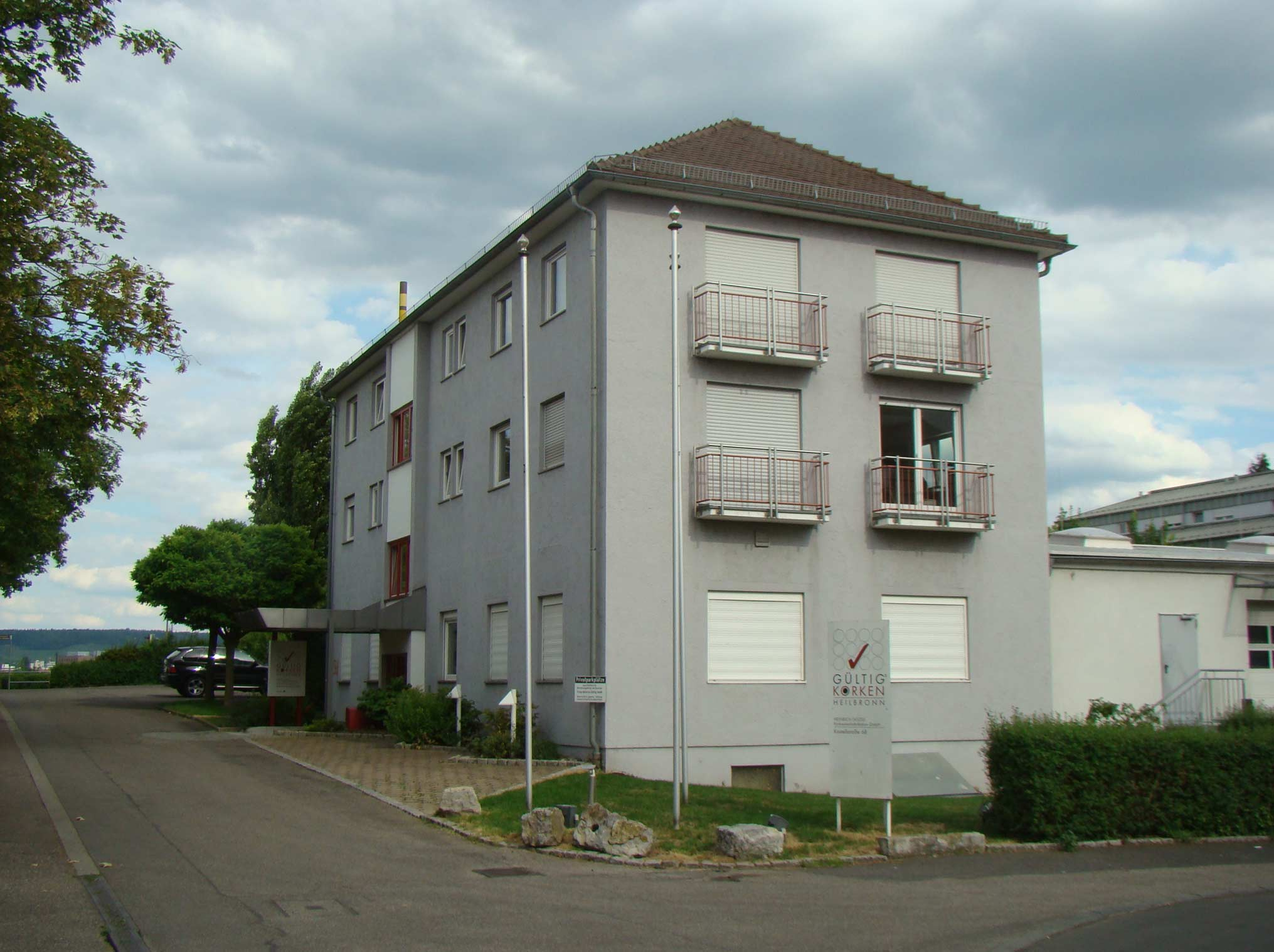 Heinrich Gültig Korkwarenfabrikation GmbH, Kastellstraße 66, 74080 Heilbronn